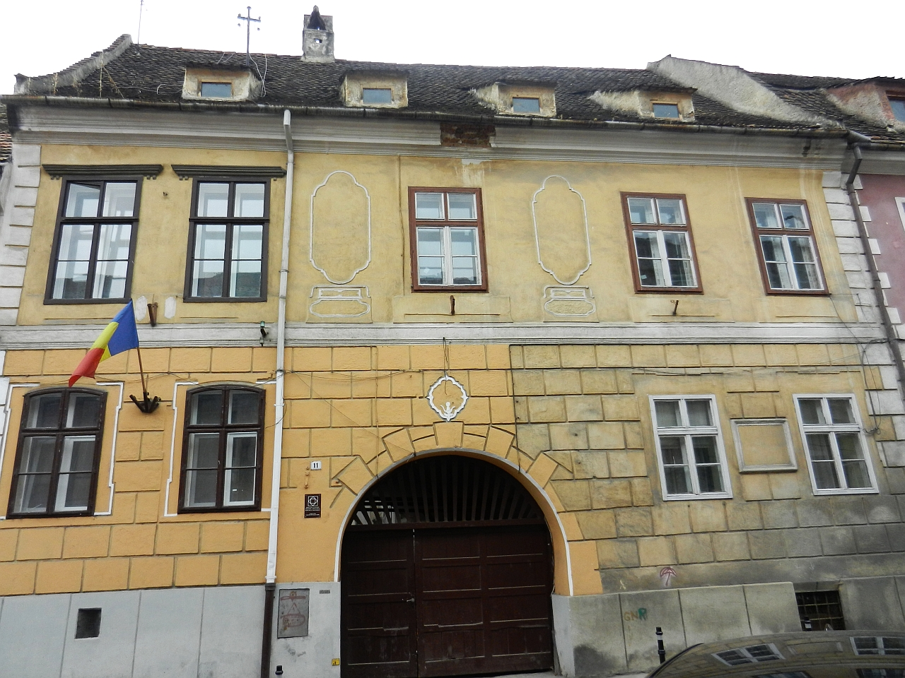 Casă monument istoric